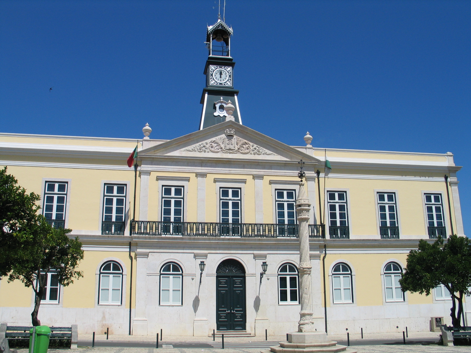 Benavente (Portugal) - Paços do concelho / Town Hall